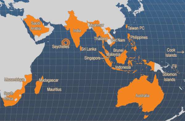 Dreifing Risa-tígrisrækju